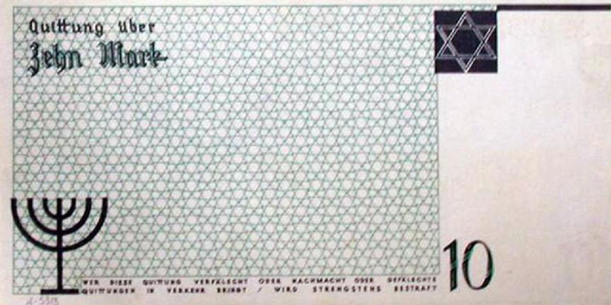 Getto Litzmannstadt 10 marek - awers